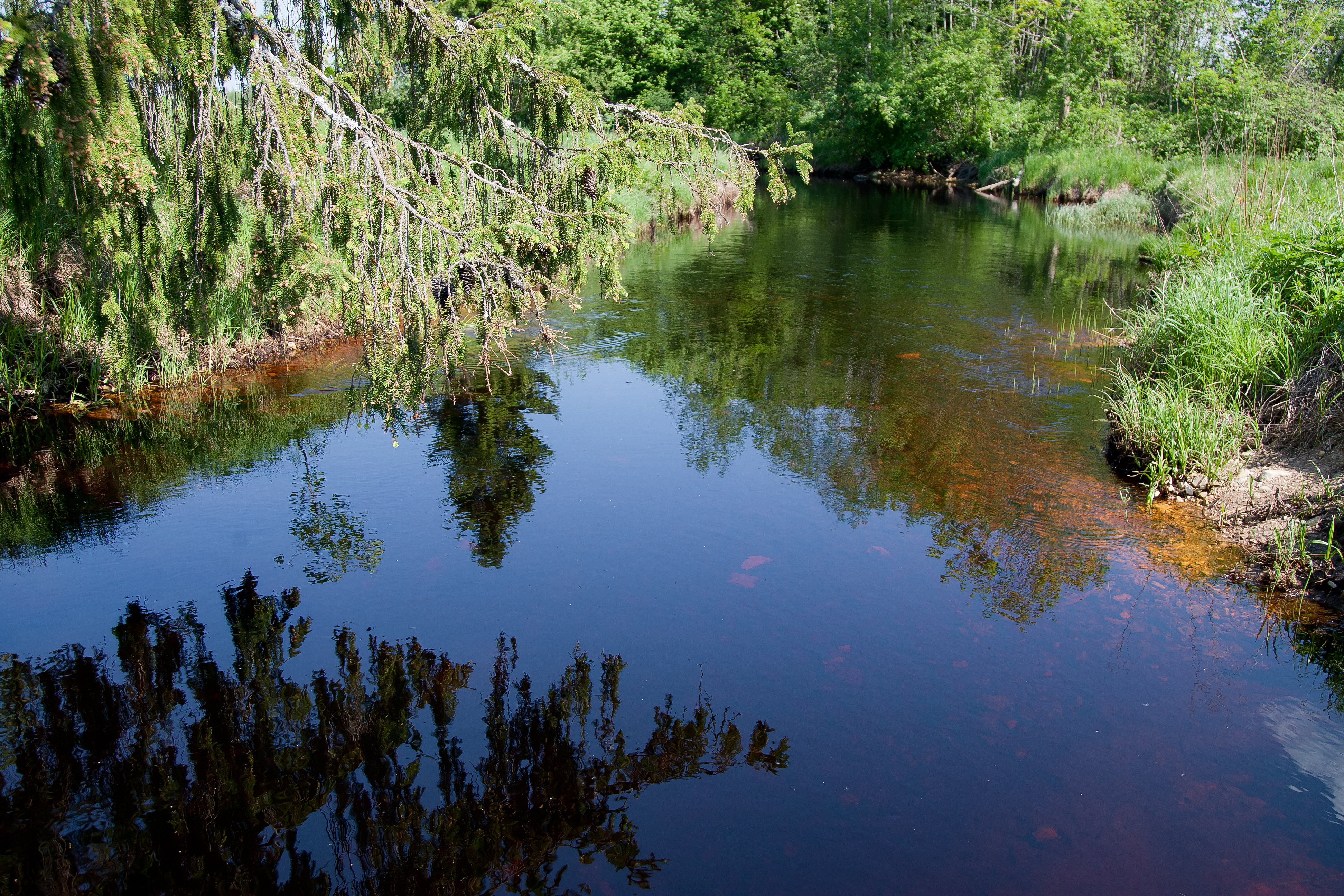 Tuhala maastikukaitseala